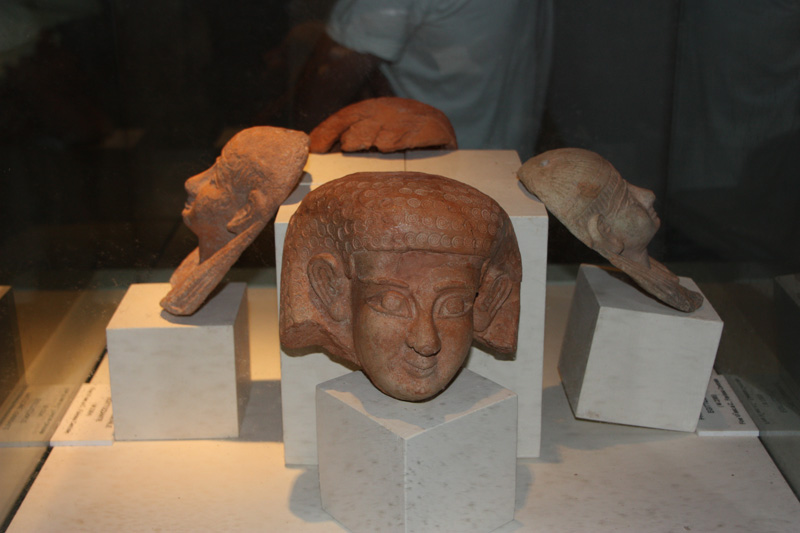 Museo Whitaker a Mozia: maschere votive fenicie in stile egittizzante.